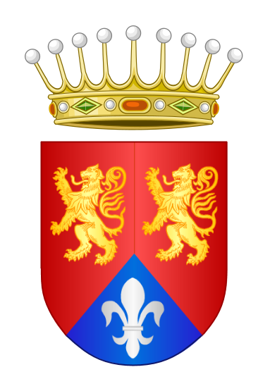 Escudo de los condes de Fuente el Salce (diseño moderno)